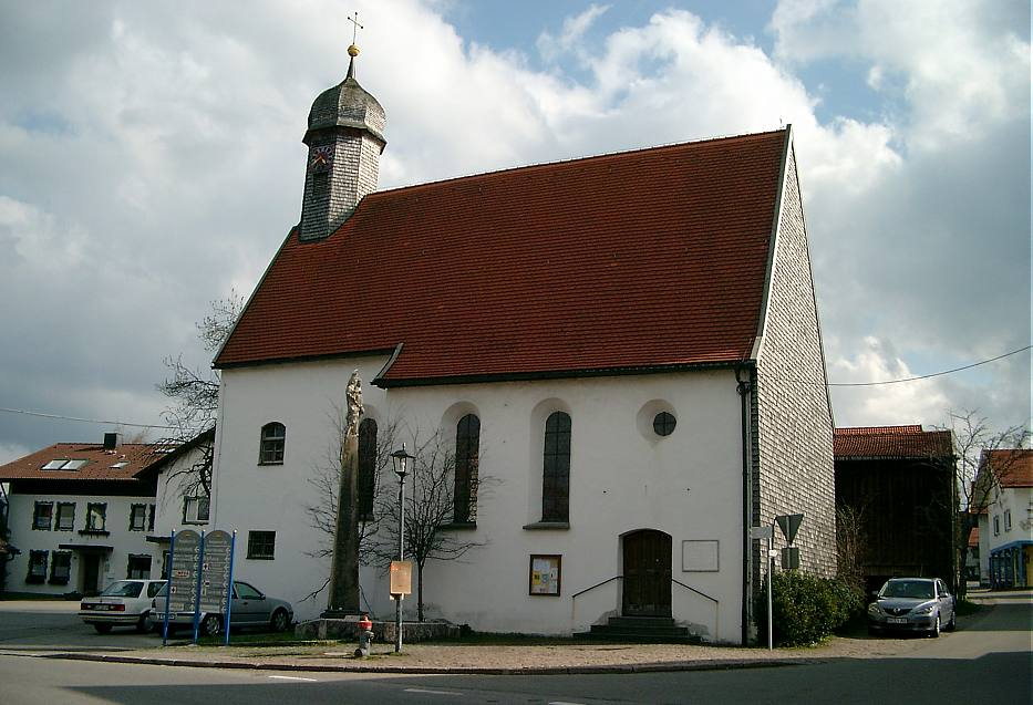 Die Marienstatue in Oy auf dem St.-Anna-Platz heutzutage